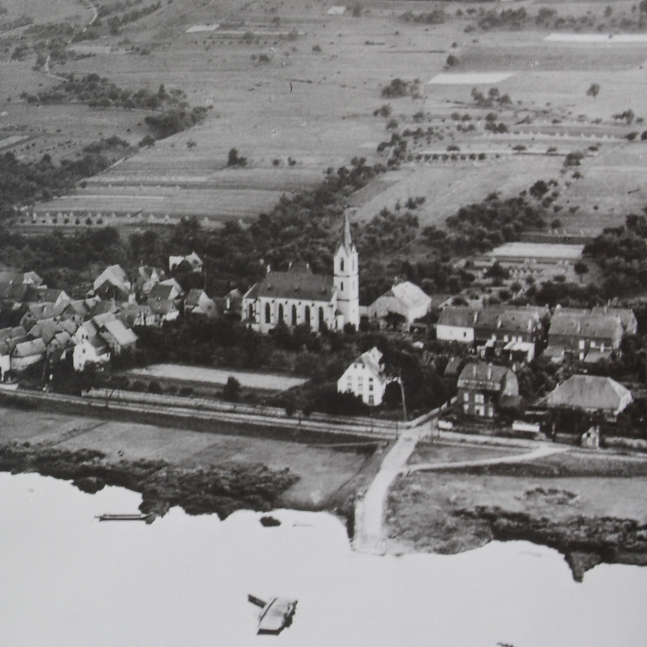 Die erste Lösnicher Fähre (Gierseilfähre) von 1899 beim Überqueren der Mosel.